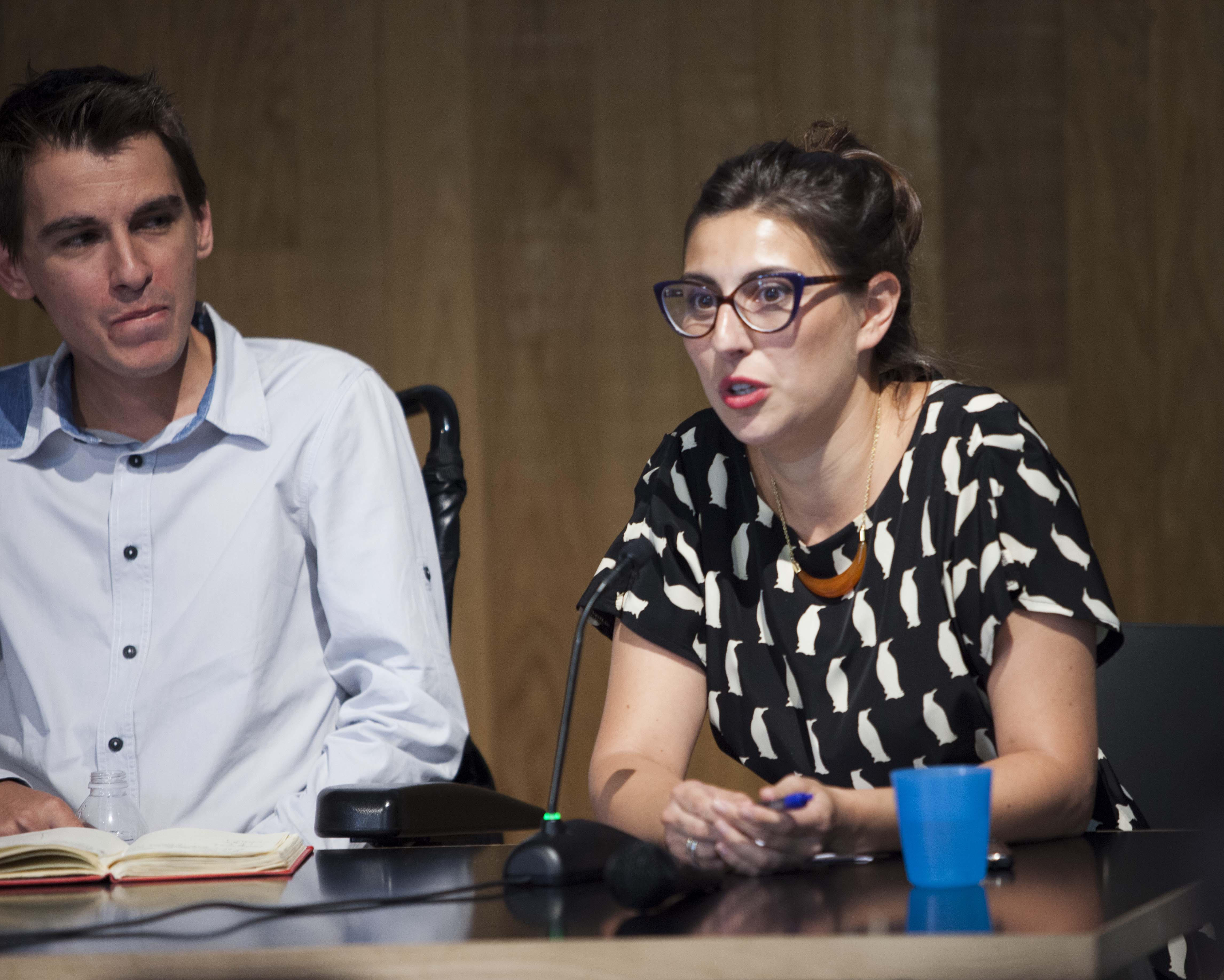 Miércoles 29 de julio 2015